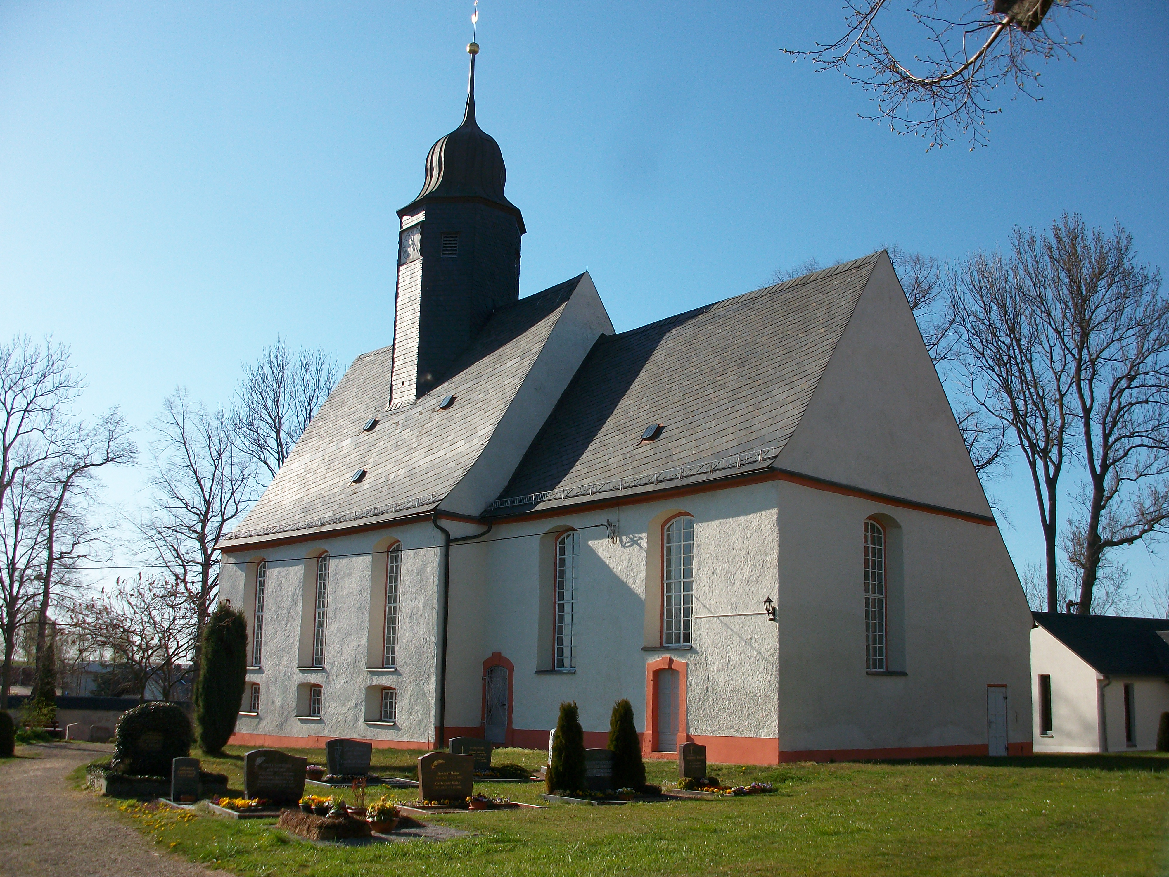 Kirche Frankenau (Mittweida)